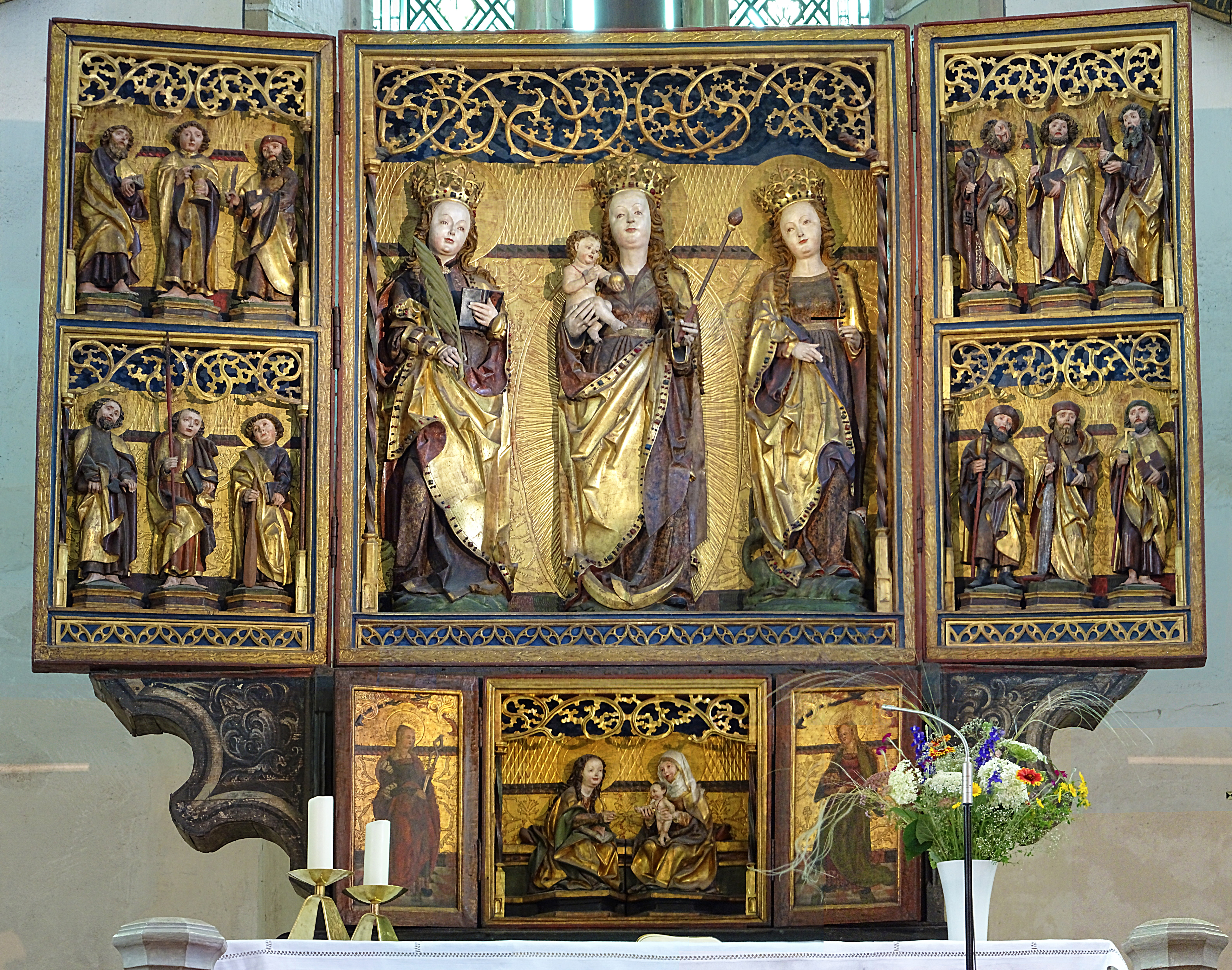 gotischer Flügelaltar (1510-1515) in der St.Annen-Kirche (Eisleben)